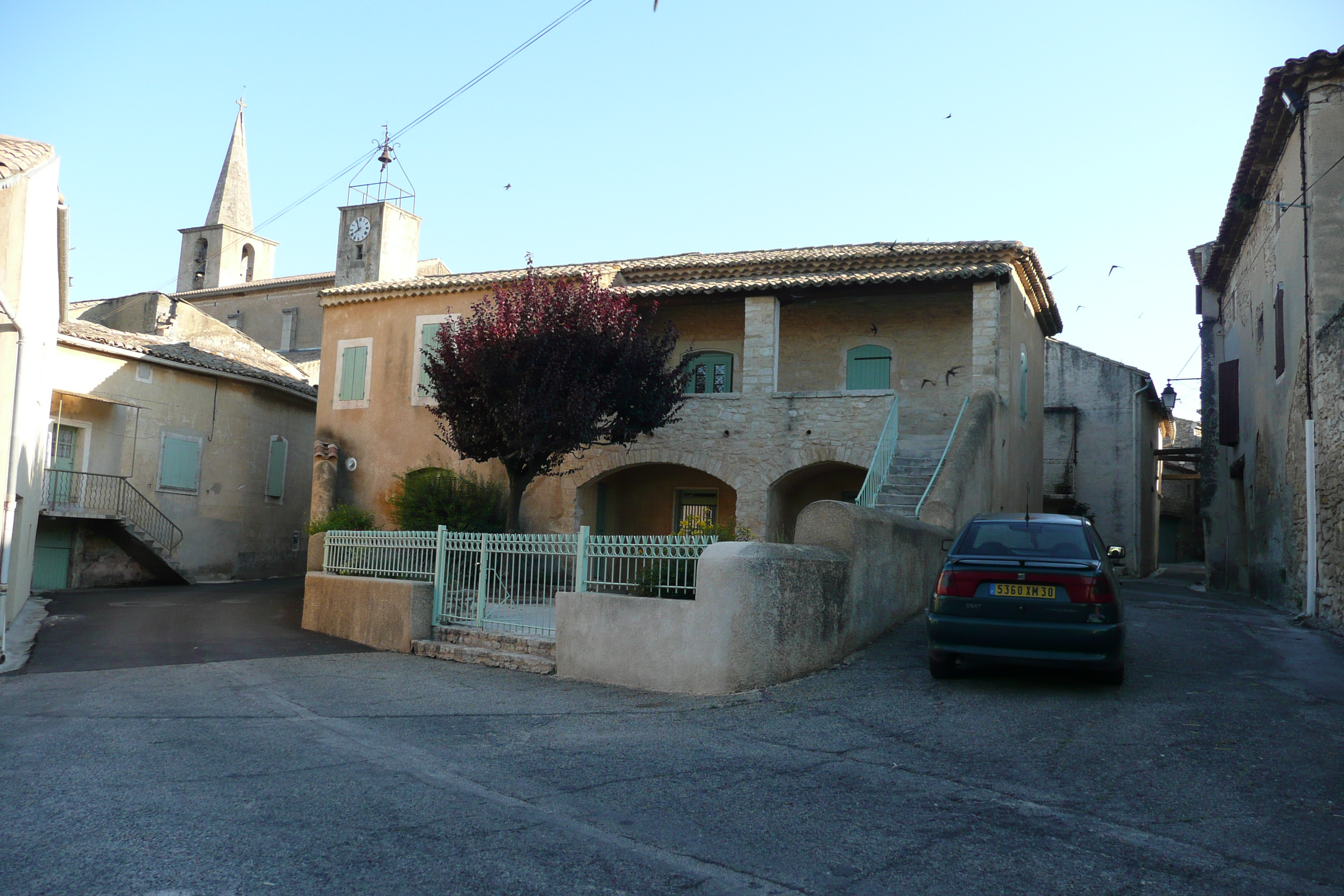 Eglise à Saint Gervais.